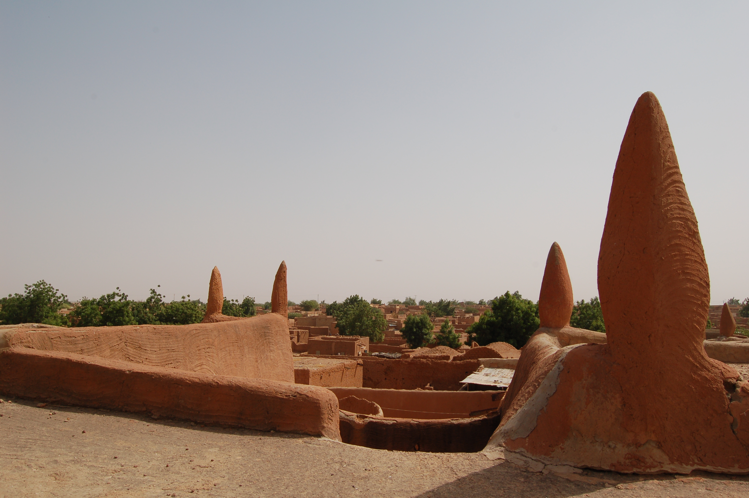 Palais du sultan à Zinder, sultan's palace in Zinder